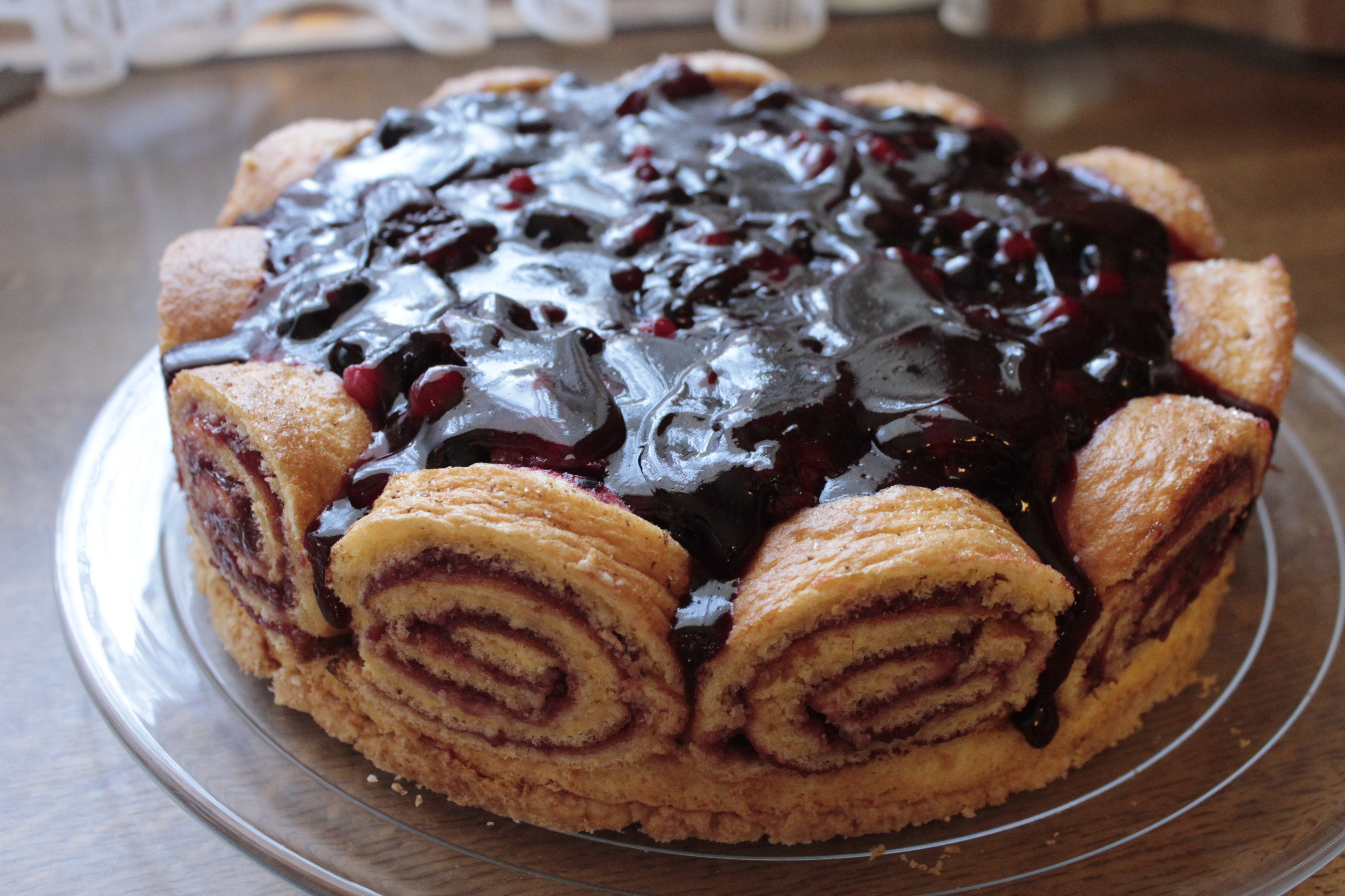 Die vielschichtige Brüsseler-Torte mit Beerensahne